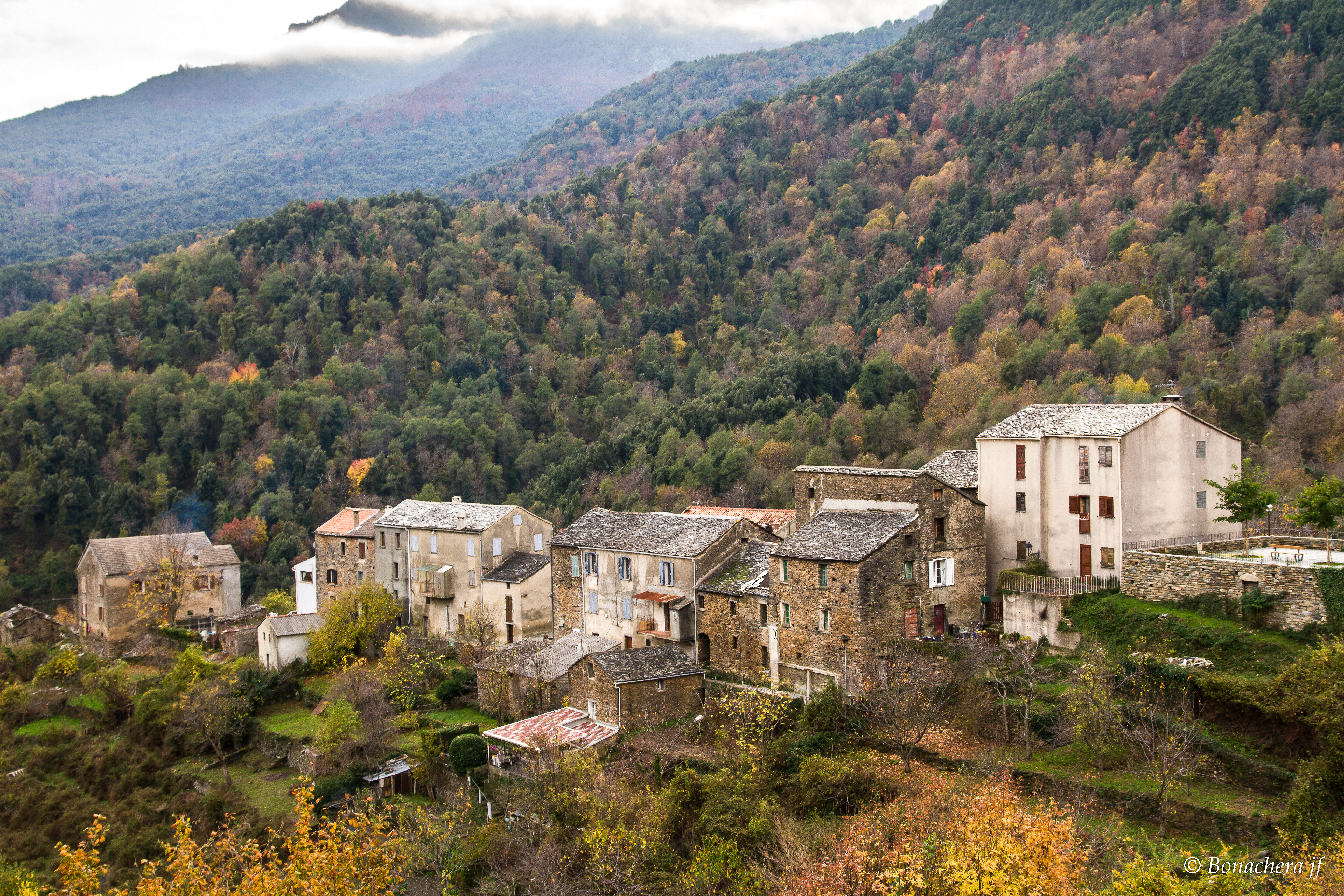 Pie-d'Orezza